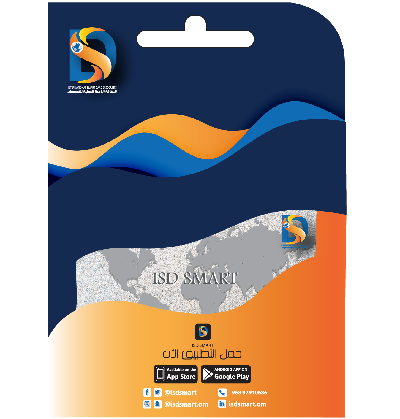 غلاف كرتون البطاقة الذكية الدولية للخصومات